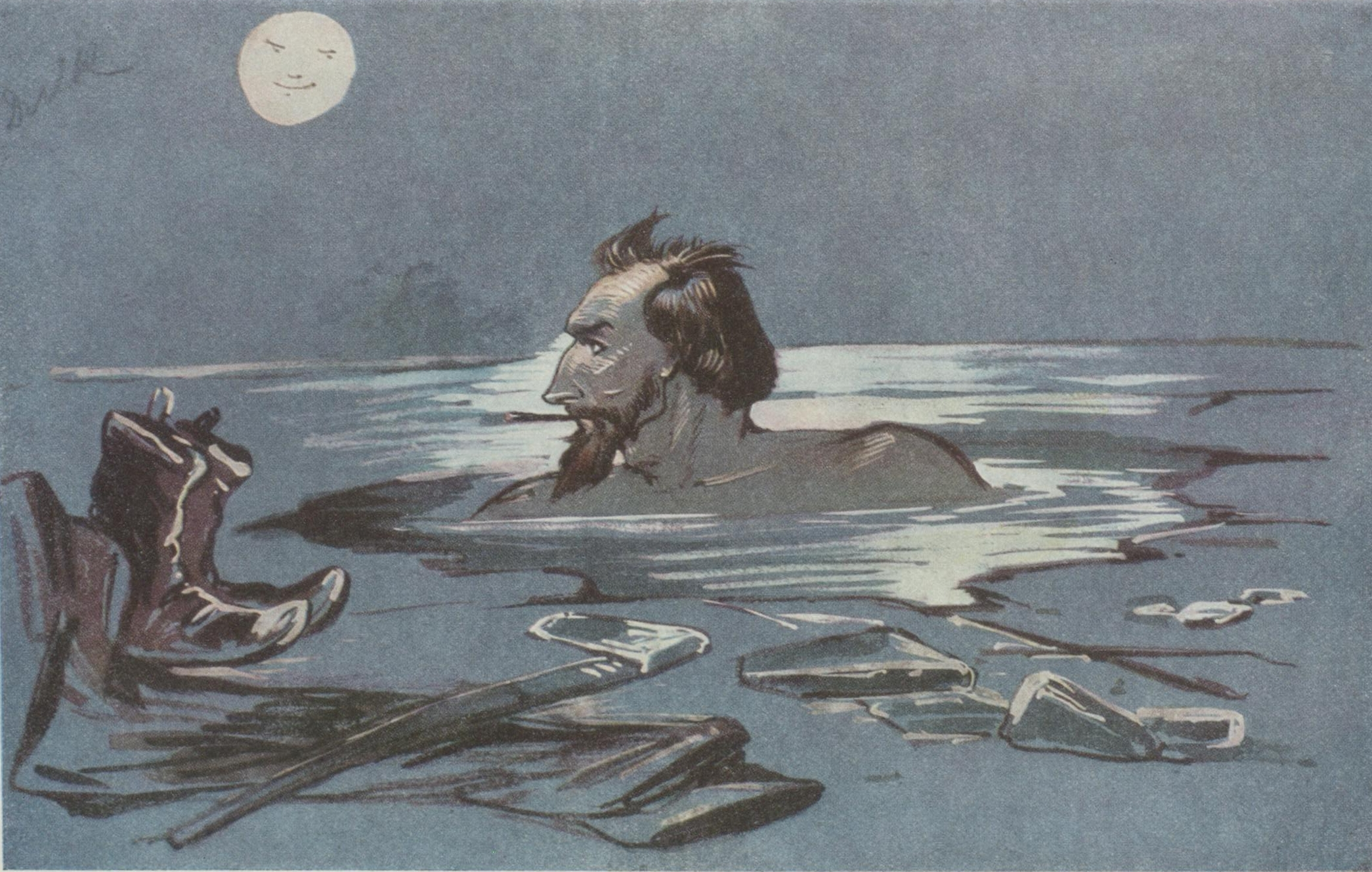 Karikatur von Albert Dulk von Unbekannt, vor 1884. Aus dem Album der Stuttgarter Künstlergesellschaft „Das Strahlende Bergwerk“.